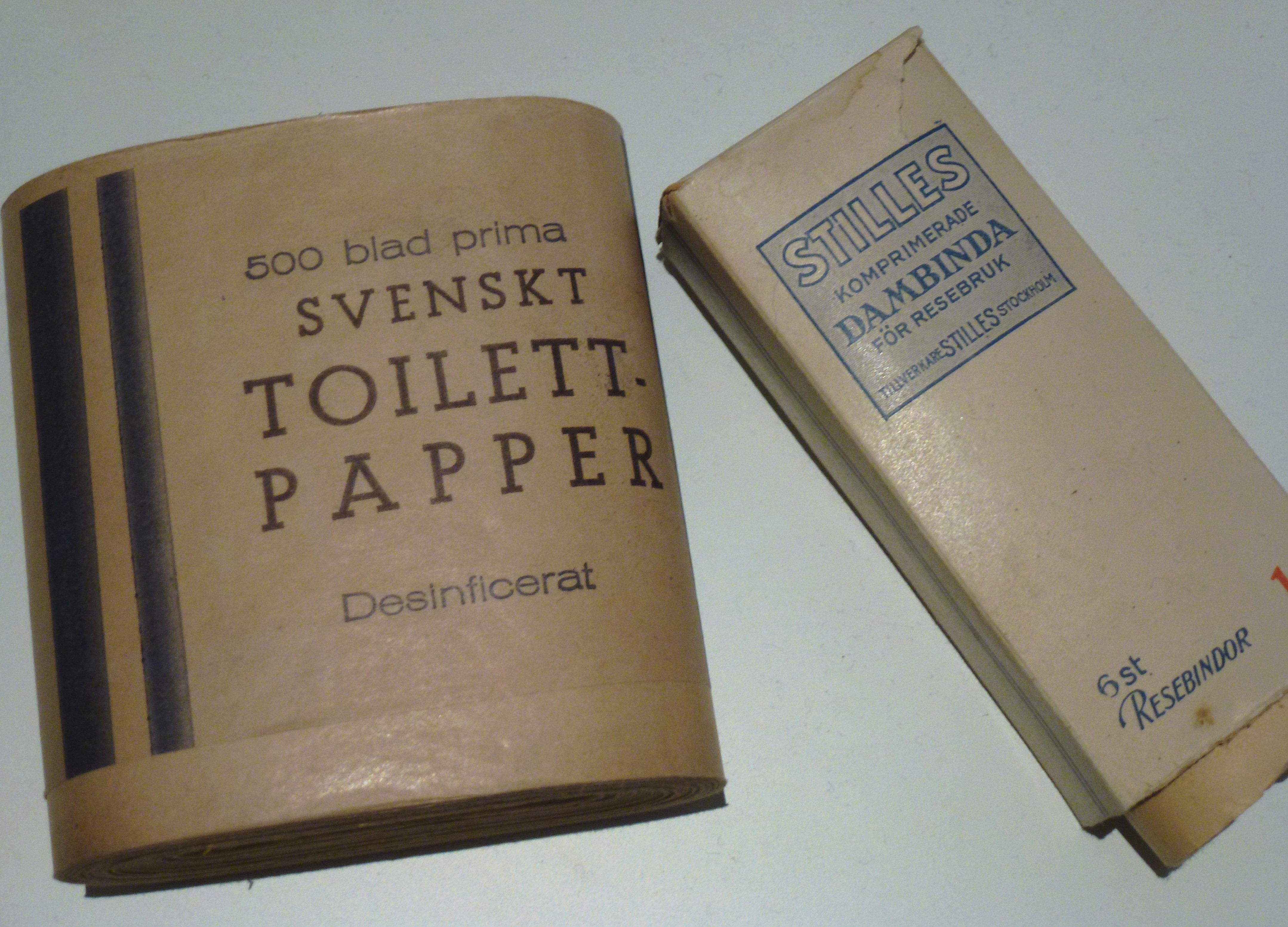 Stockholms läns museum utställning: Atombomb över Stockholm